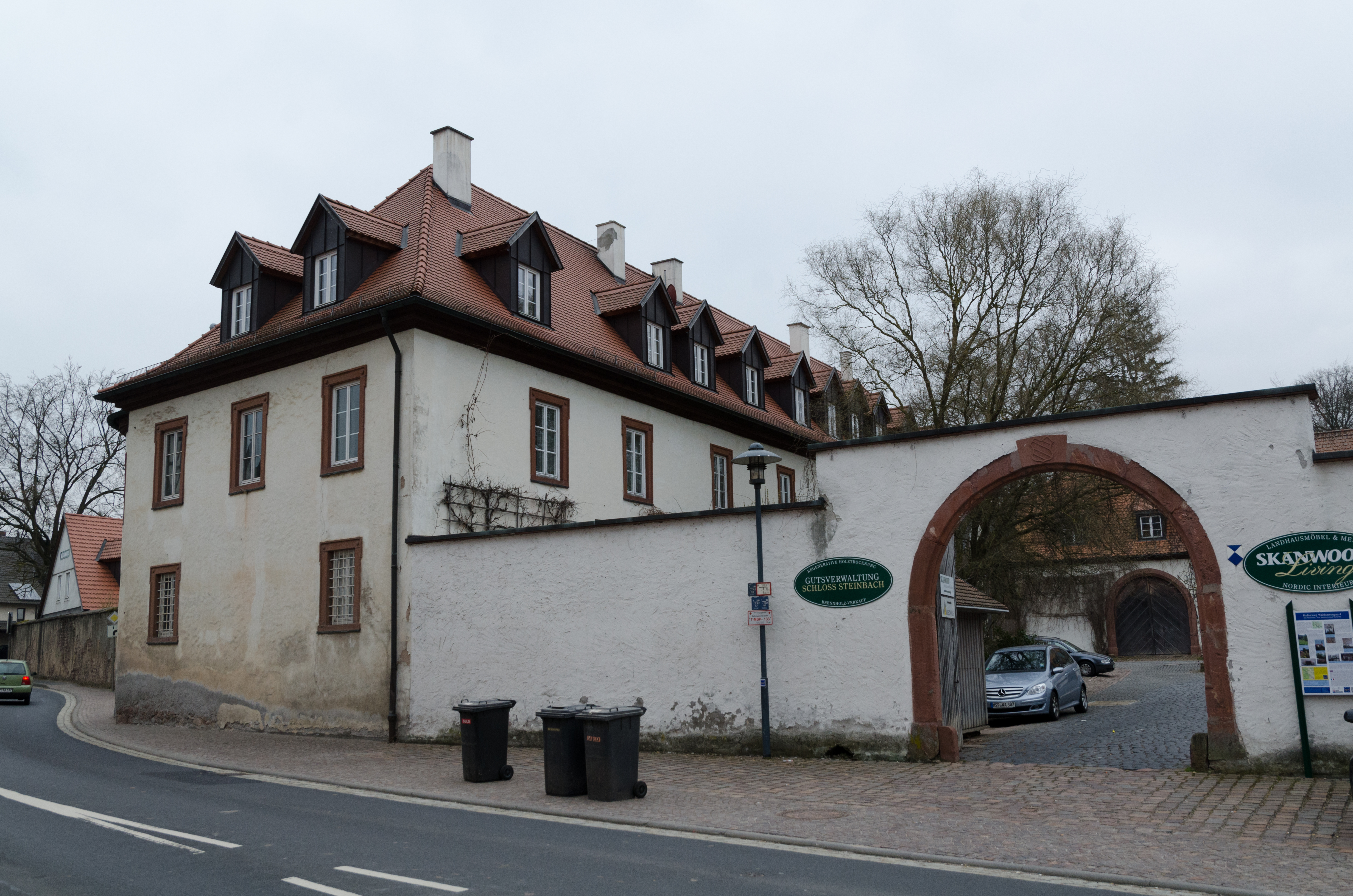 Lohr, Steinbach, Steinbacher Straße 3, 3a